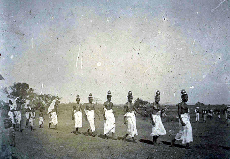 കണ്ണാടിപ്പറമ്പിലെ ക്ഷേത്രത്തിലേക്ക് നേര്‍ച്ചയും കൊണ്ട് പോവുന്നവര്‍.